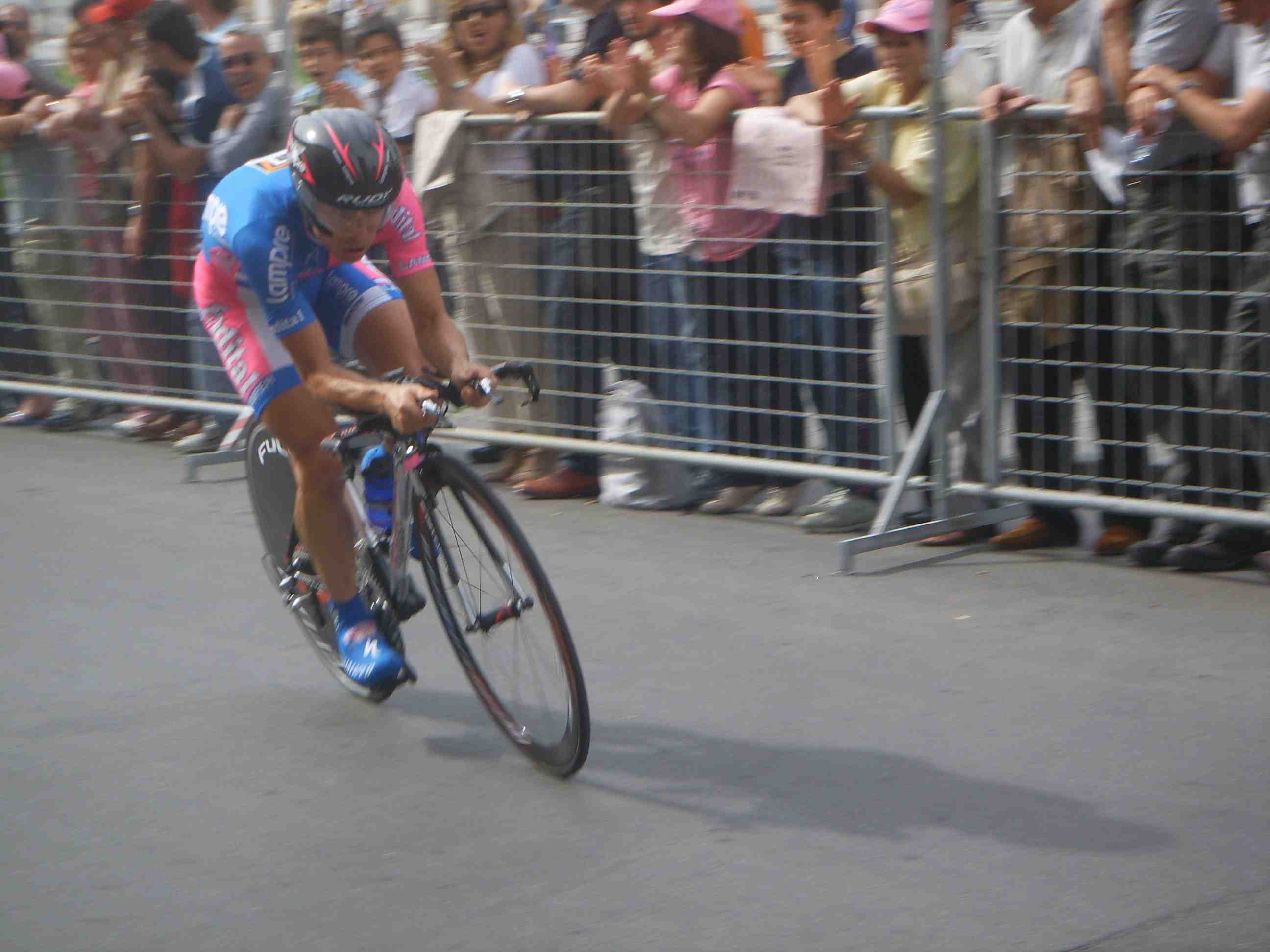 Damiano Cunego in azione durante la crono di Pontedera al Giro 2006.